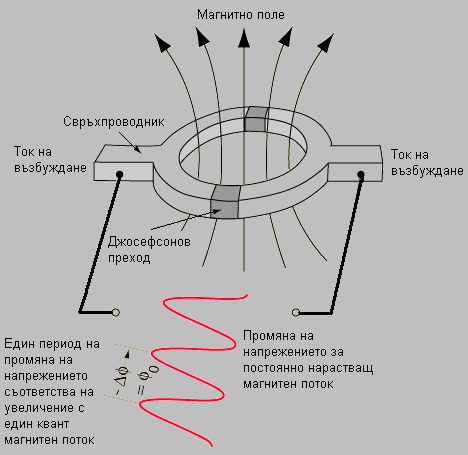 Свръьпроводников интерферометър (СКУИД)